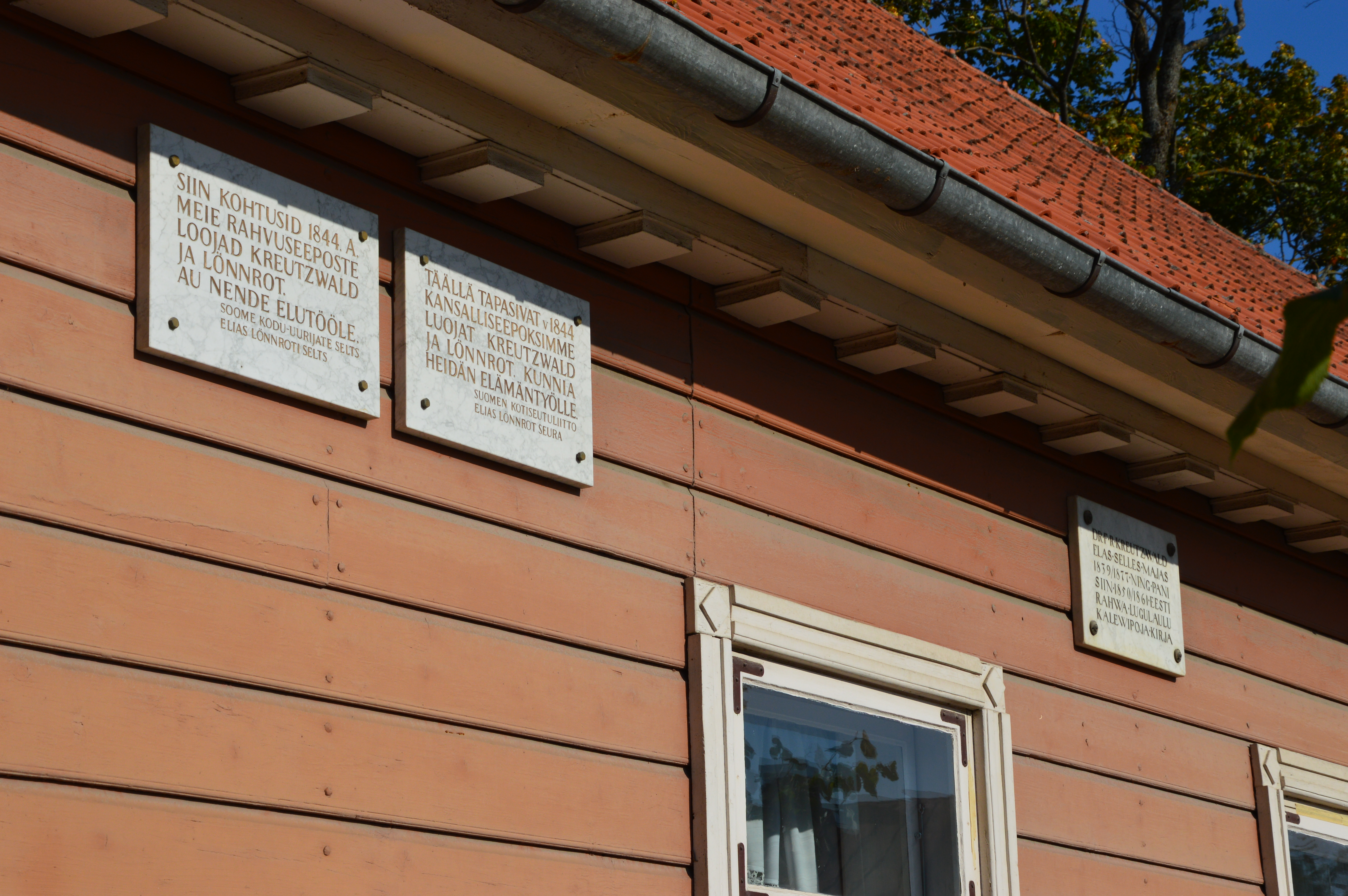 Hoonete kompleks, kus aastail 1833-1877 elas ja töötas Friedrich Reinhold Kreutzwald.